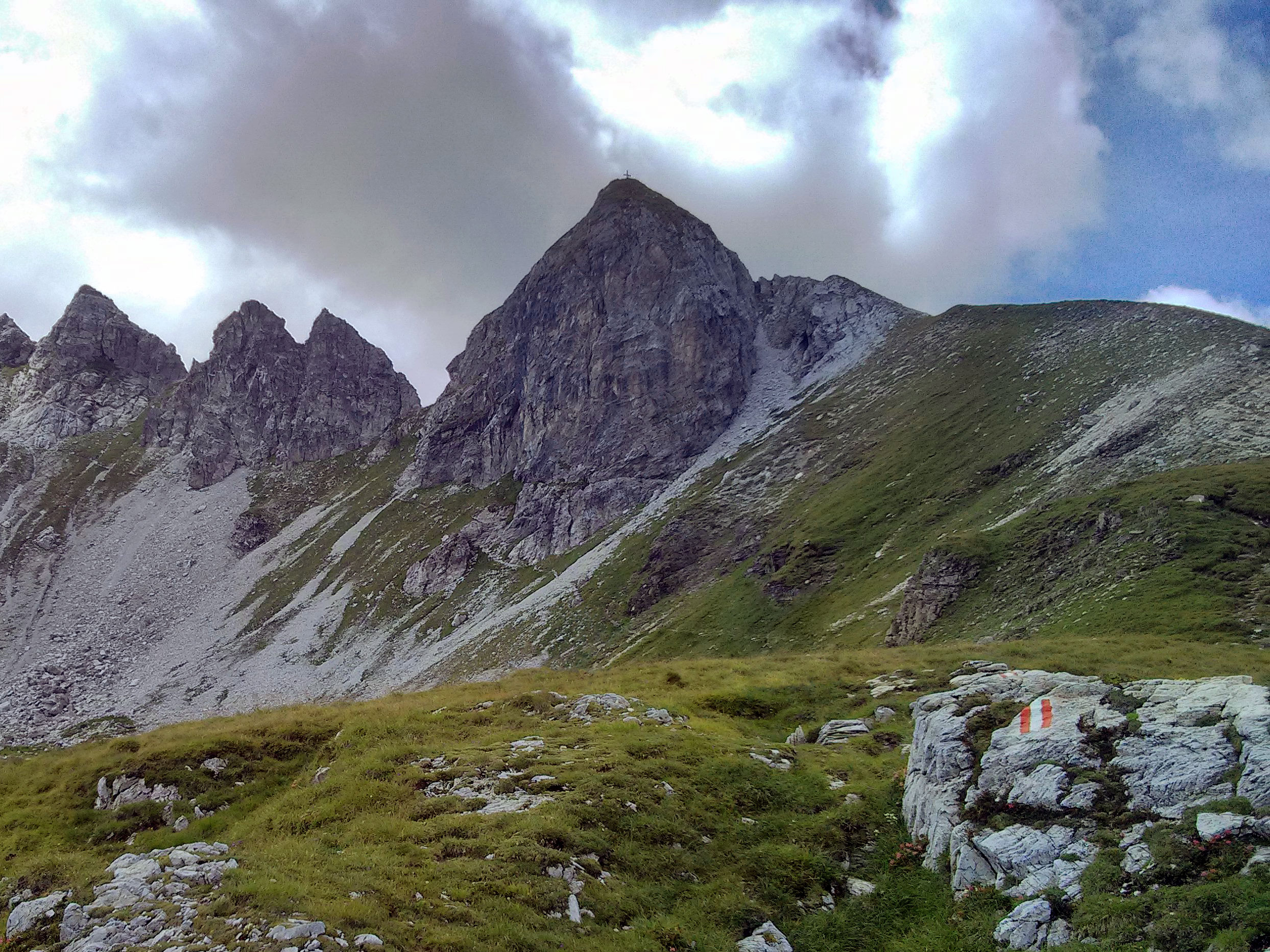 Blick auf das Gamsspitzl